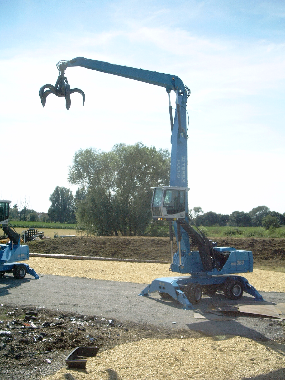 Terex-Fuchs MHL 360 beim Tag der Offenen Tür zum 50. Jubiläum des Baggerherstellers Terex-Fuchs in Bad Schönborn